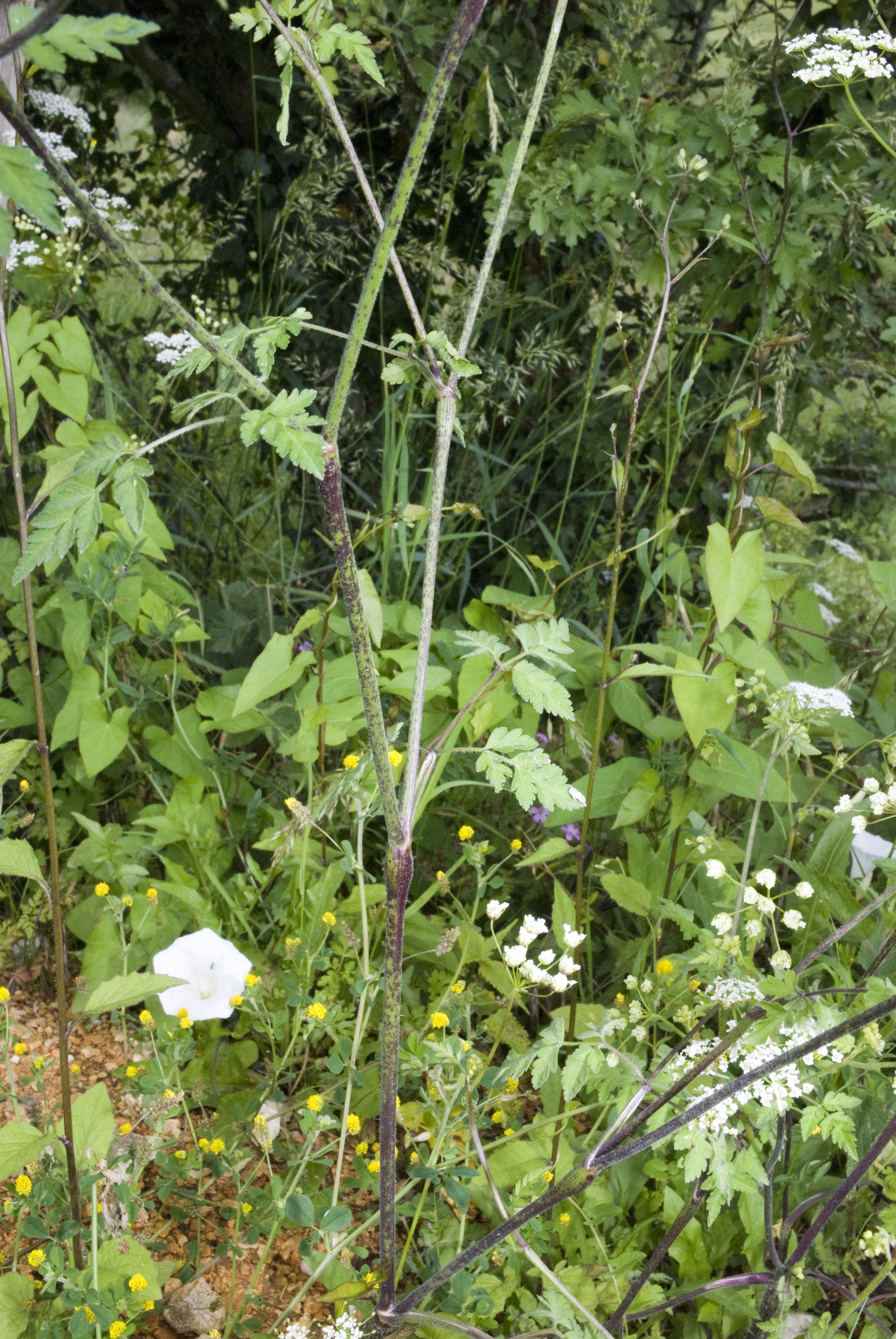 Chaerophyllum temulum Fresnes-au-Mont (Meuse), France